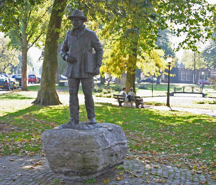 Standbeeld van Vincent van Gogh in Nuenen. Foto: Jan Weijers, Helmond